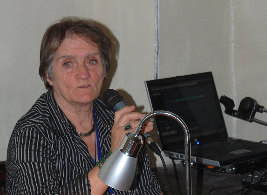 Нина Бичуя, украинский прозаик